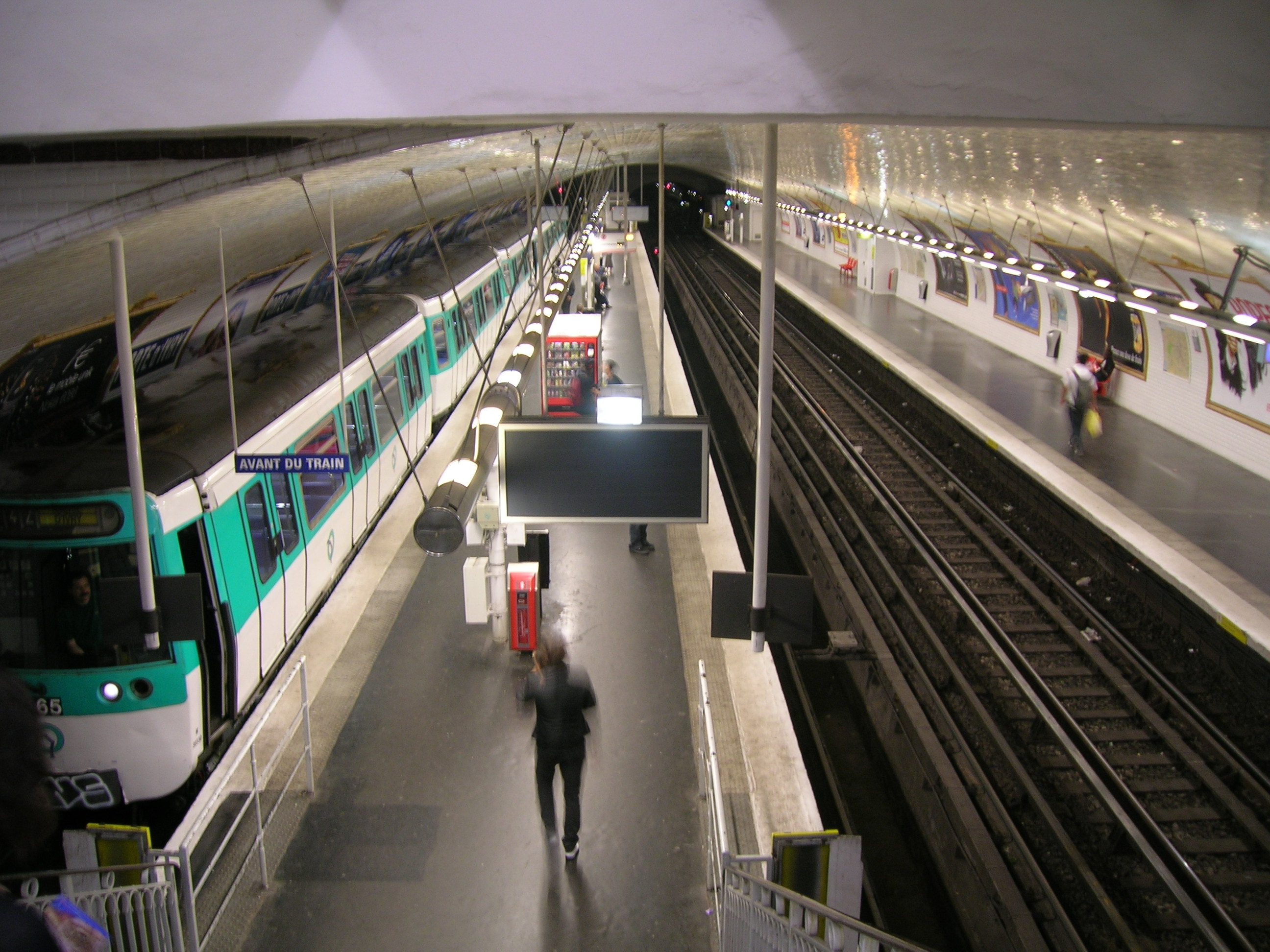 Quais de la station de métro Porte d'Ivry ligne 7, Paris